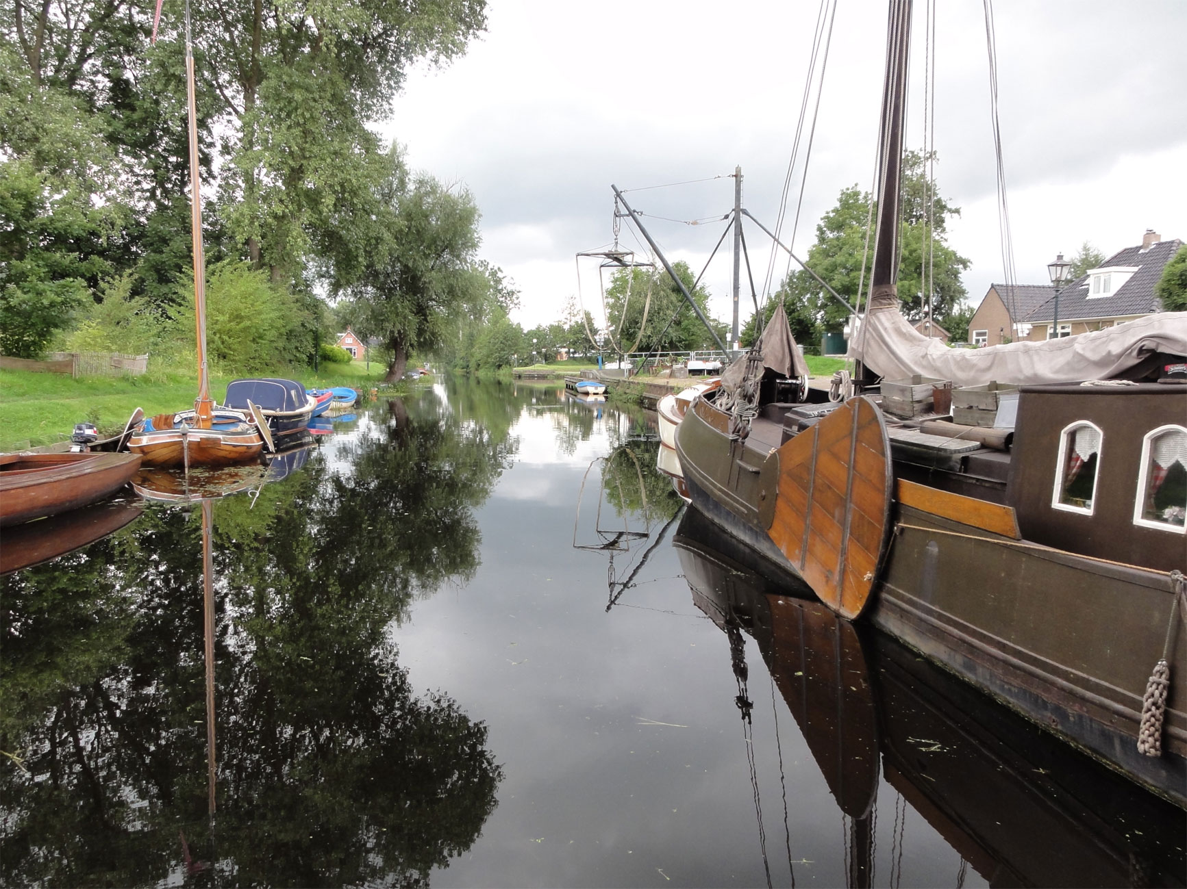 Haven van Rottevalle